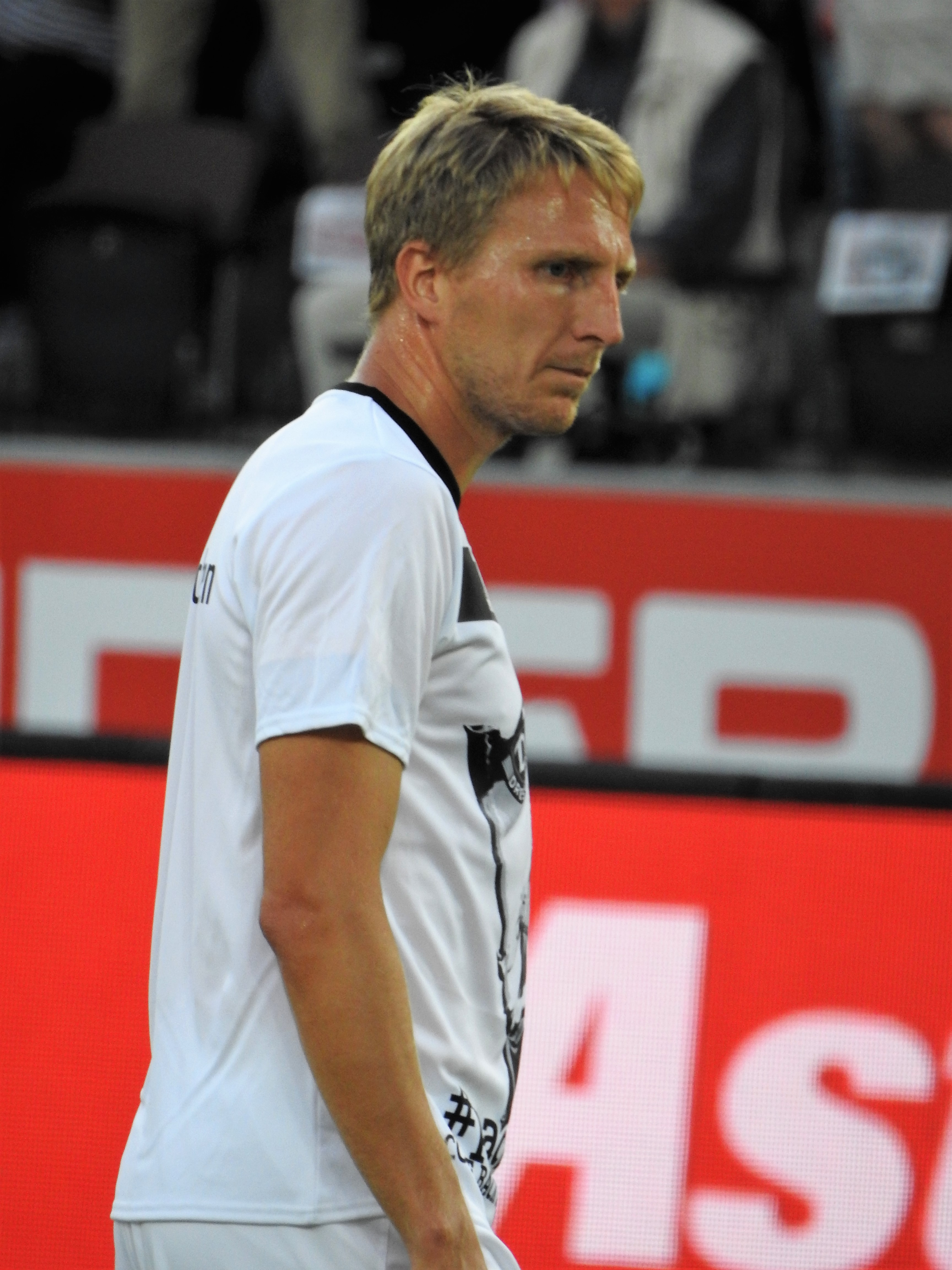 Marco Hartmann Dynamo Dresden